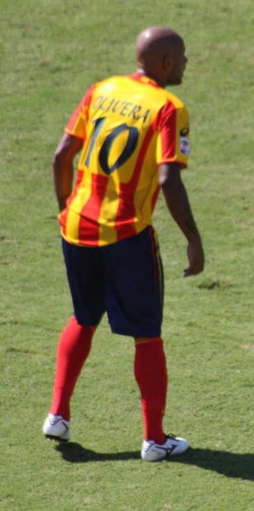 Ruben Olivera durante il match di campionato del Lecce contro il Catania